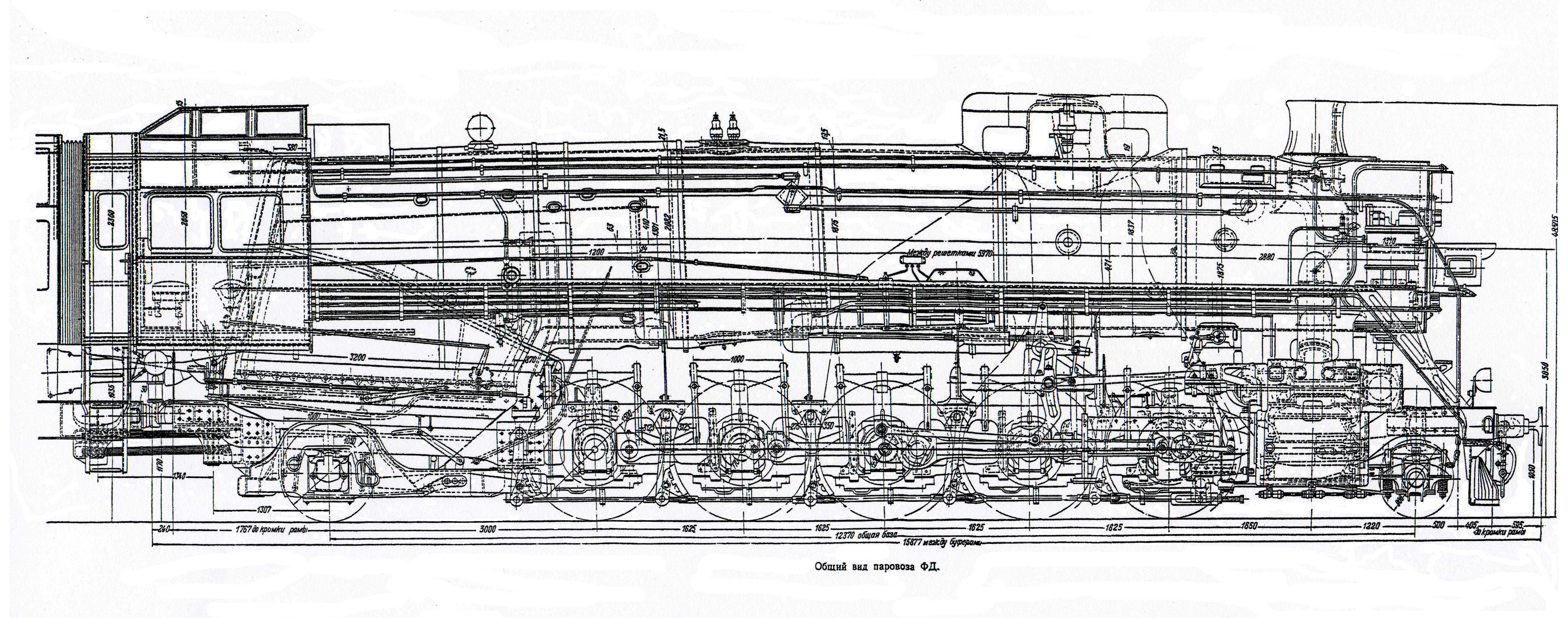 Конструктивная схема паровоза серии ФД. "второго заказа",("1П/II"), вариант без дымоотбойных щитов, 1936 года постройки.